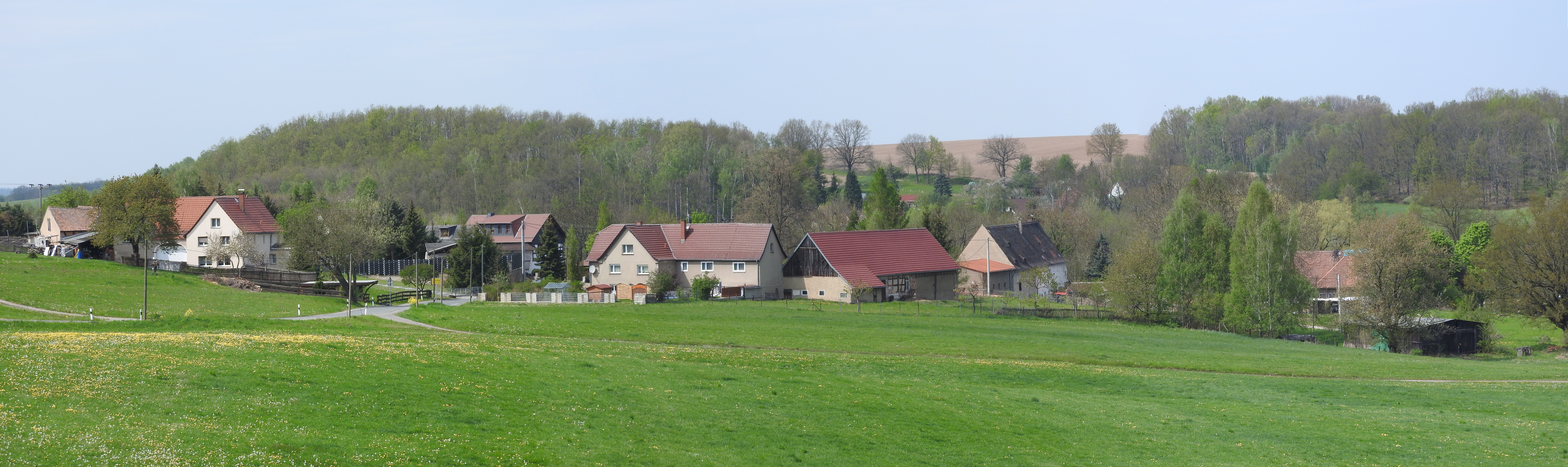 Blick von Südosten auf Loitzsch, Thüringen